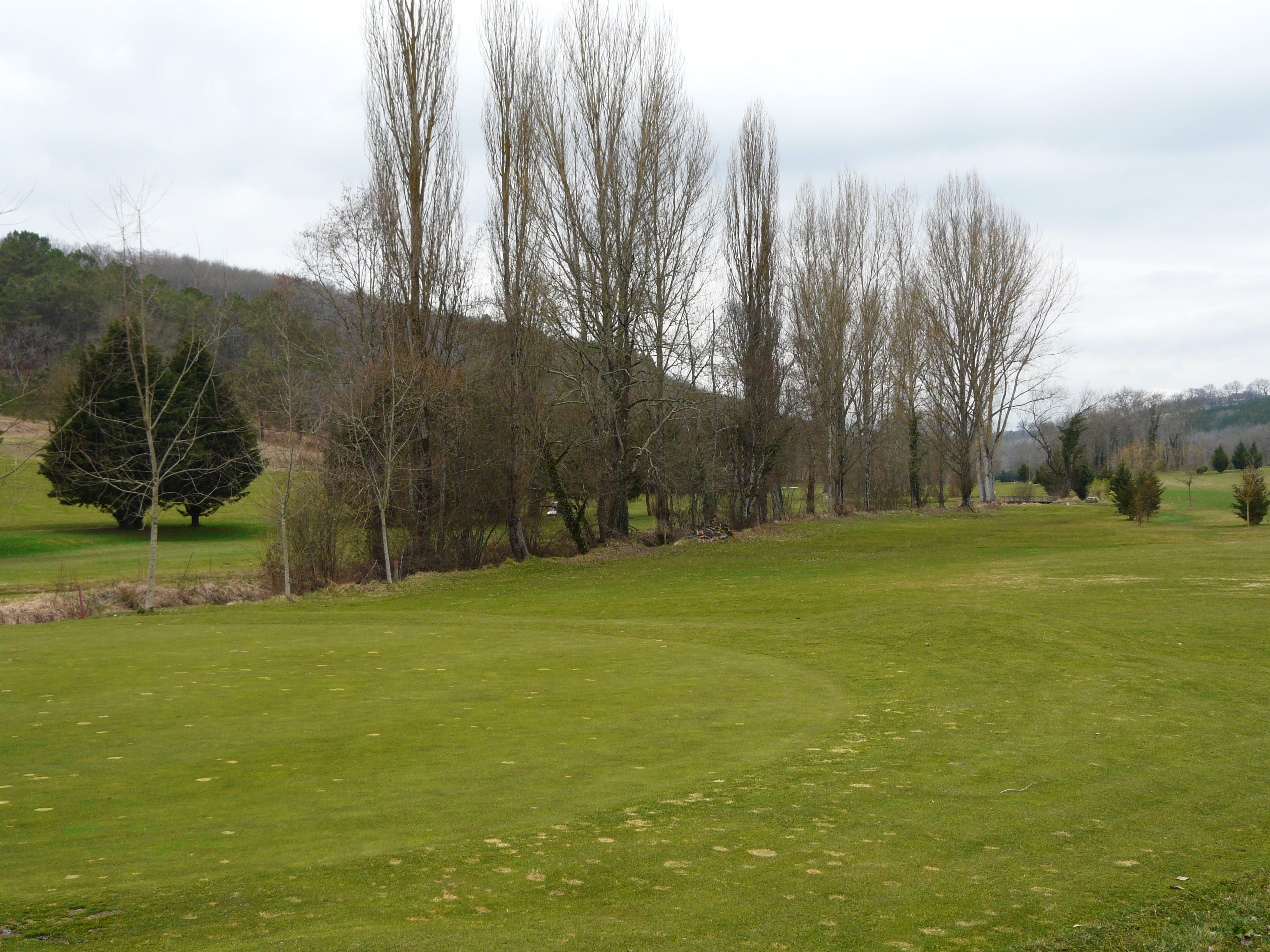 Partageant le terrain de golf en deux, un mince rideau de peupliers marque la trace du ruisseau "la Vallée" ; Sagelat, Dordogne, France